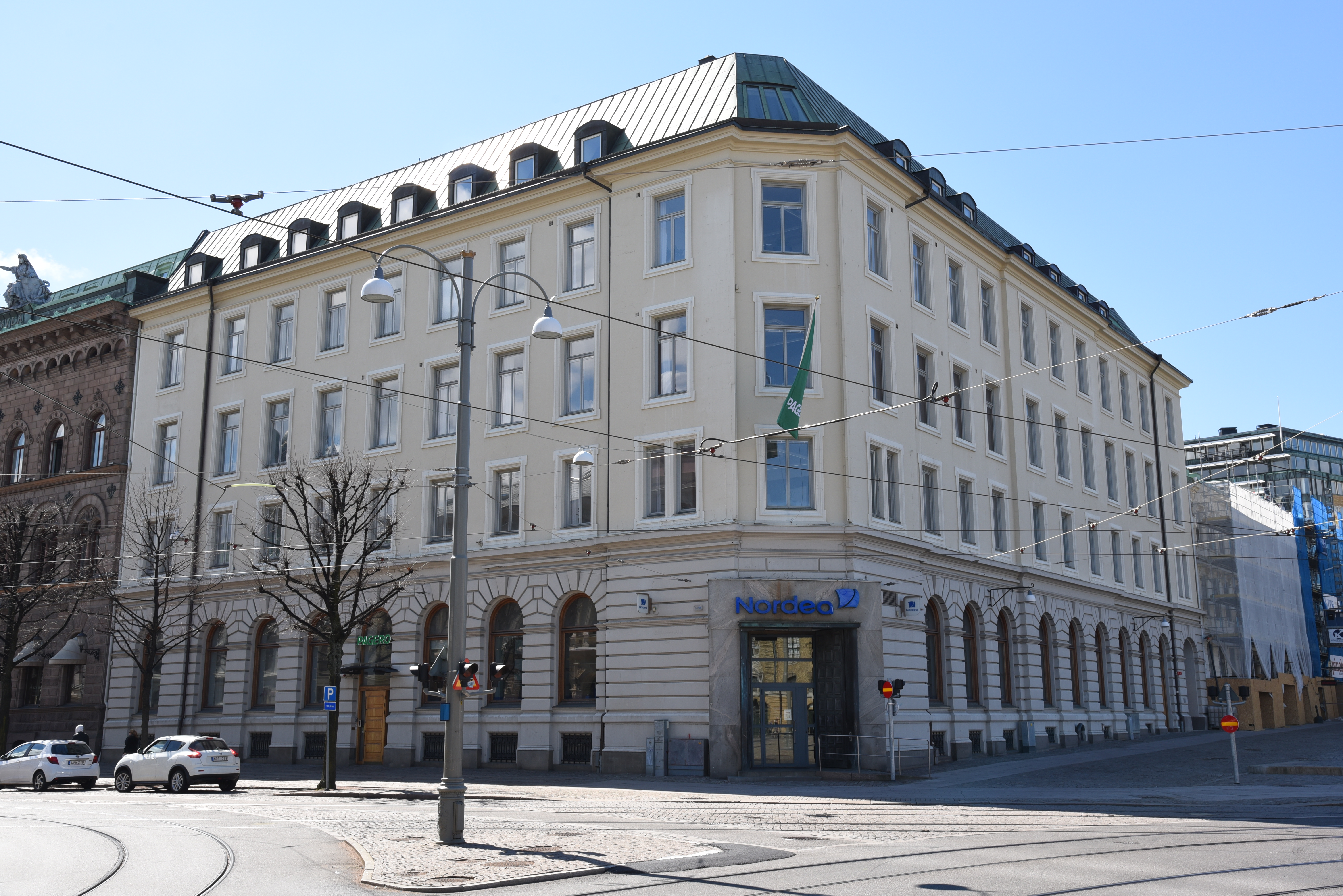 Västra Hamngatan 1–Lilla Torget 5–6 i kvarteret Alströmer i stadsdelen Inom Vallgraven i Göteborg. Byggnaden uppfördes av Göteborgs Enskilda Bank år 1888 efter ritningar av Georg Krüger. Fasaden byggdes om år 1938 efter ritningar av Nils Einar Eriksson.